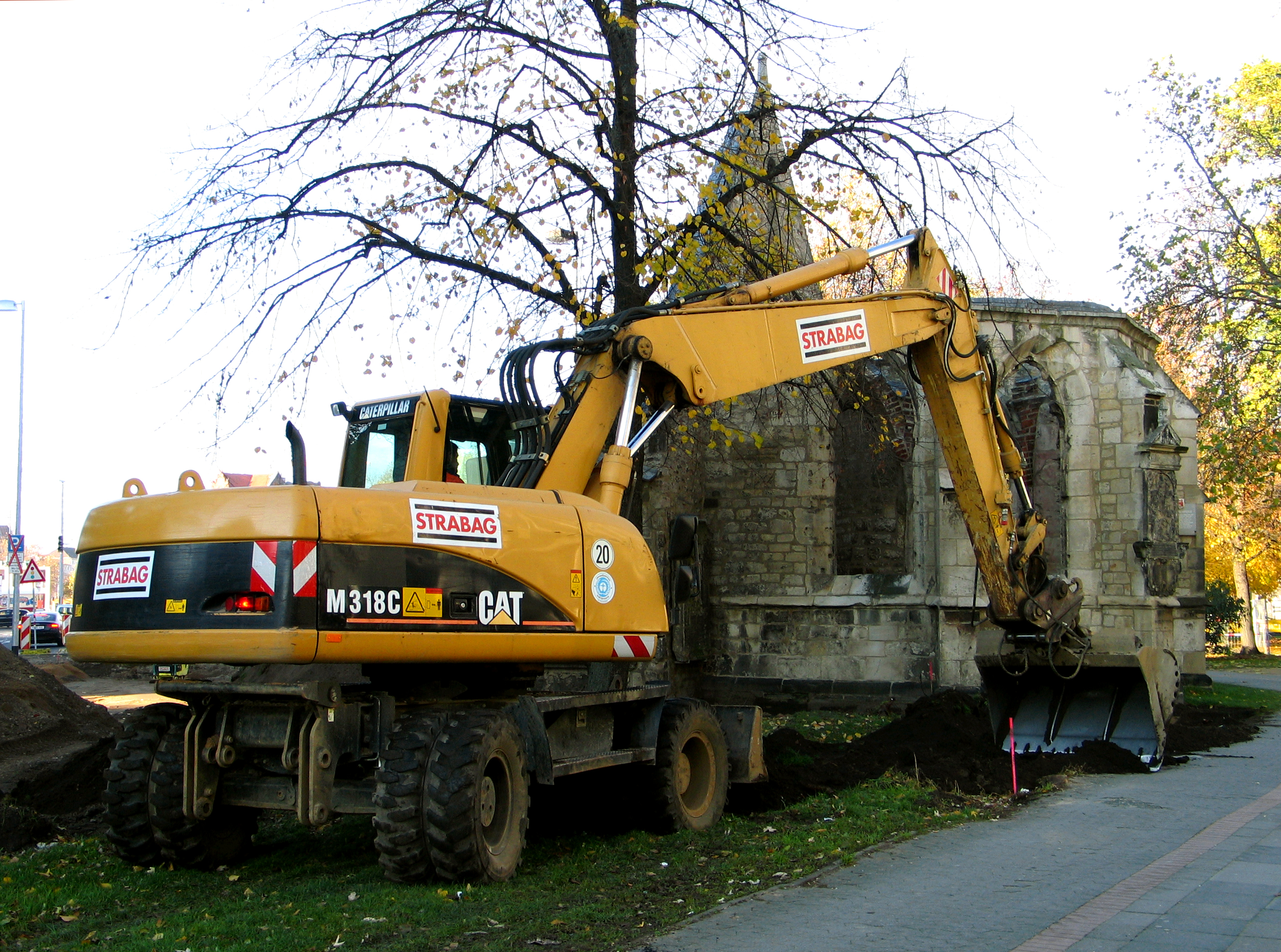 Im Rahmen von Hannover City 2020+ findet hier ein Aushub und eine Bodenabtragung statt per Bagger ungefähr einen Meter tief am ältesten Gebäude von Hannover, der Nikolaikapelle auf historischem Grund und Boden, dem Alten St.-Nikolai-Friedhof am Klagesmarkt / Goseriede ...